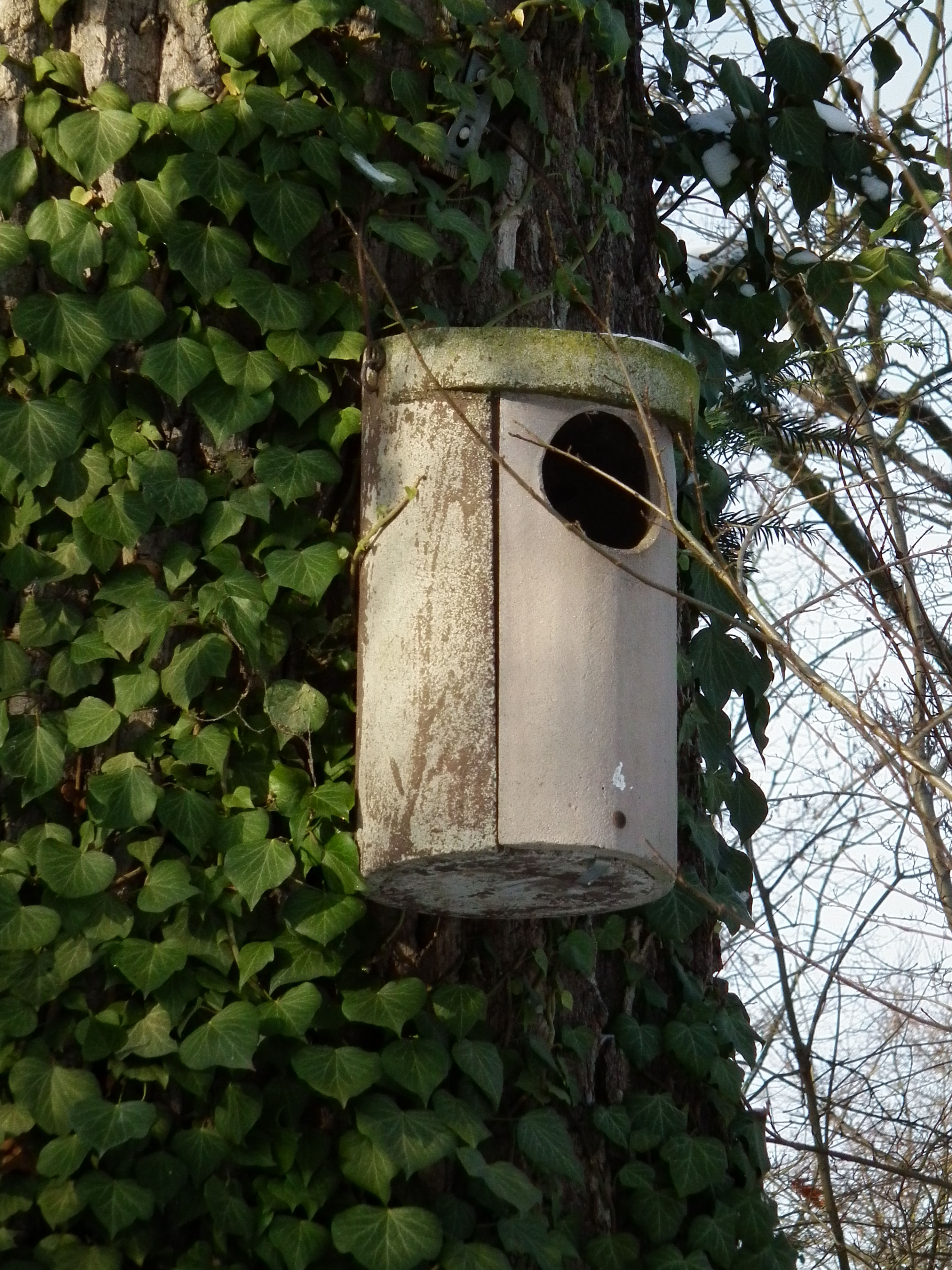 Ptačí budka pro puštíka obecného, holuba doupňáka, kavku, hohola severního či morčáka velkého ve Schwetzingenu (Badensko-Württembersko, Německo)